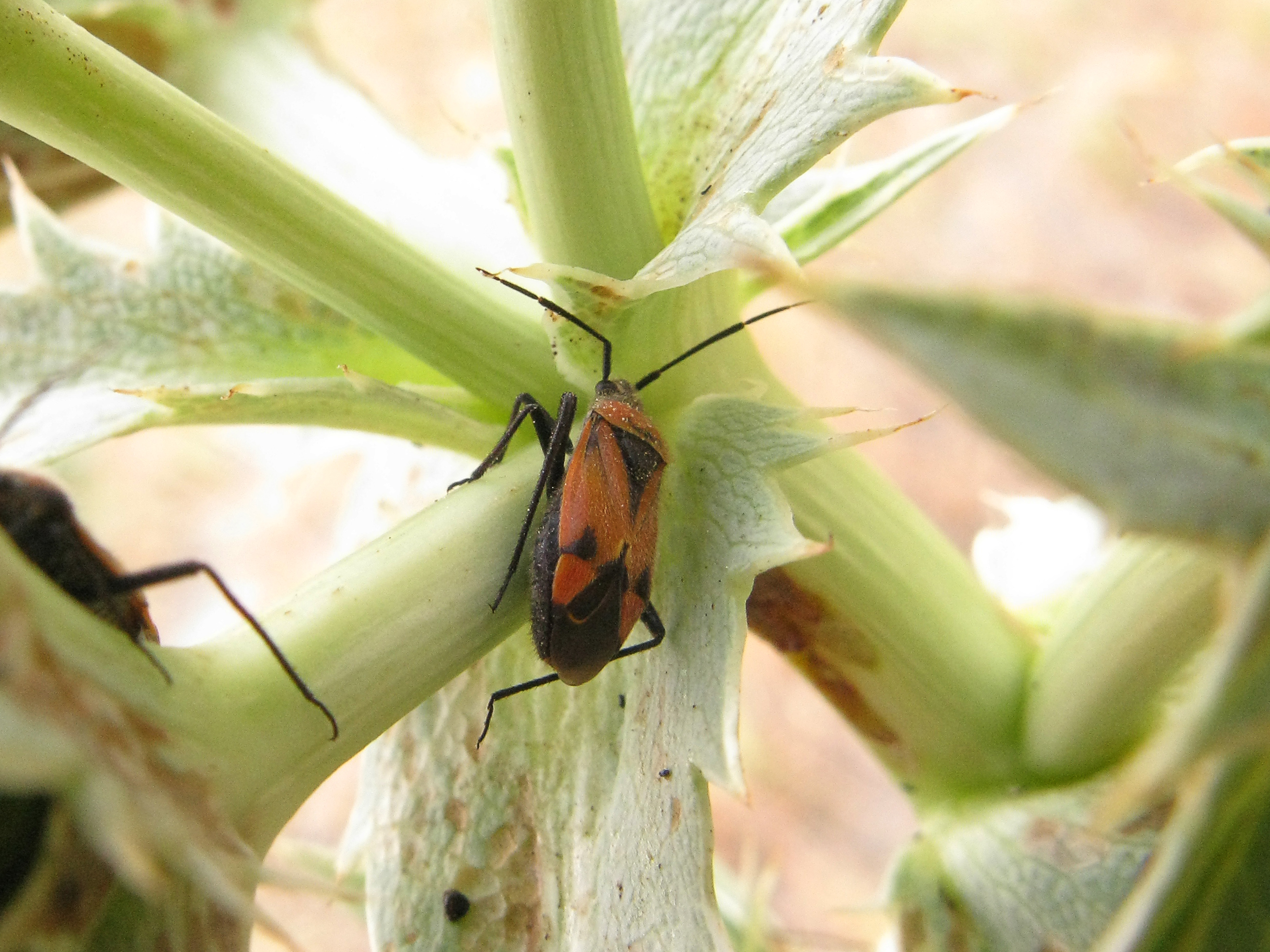 Sobre cardo corredor" Eryngium campestre